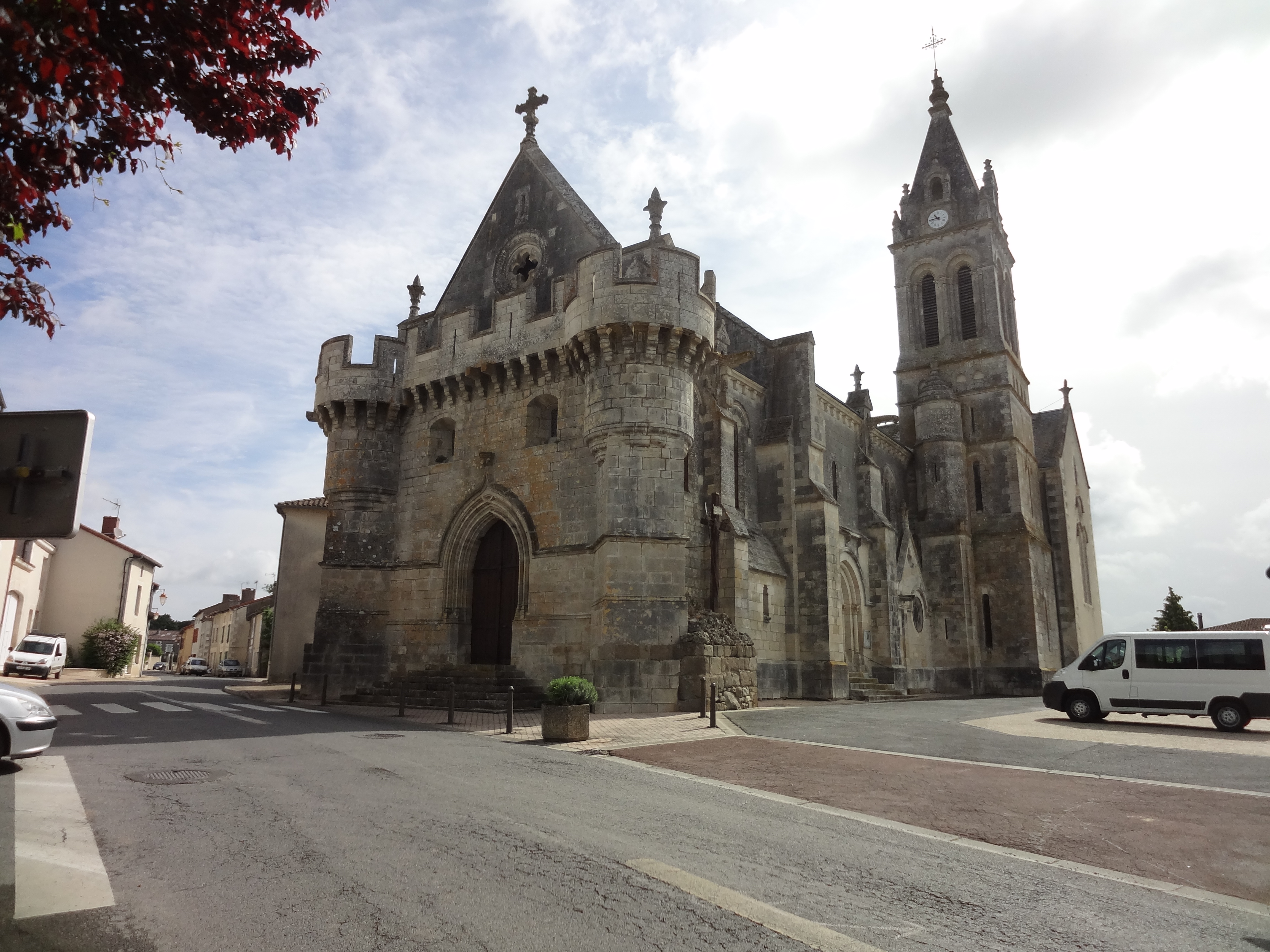 Église fortifiée d'Adriers